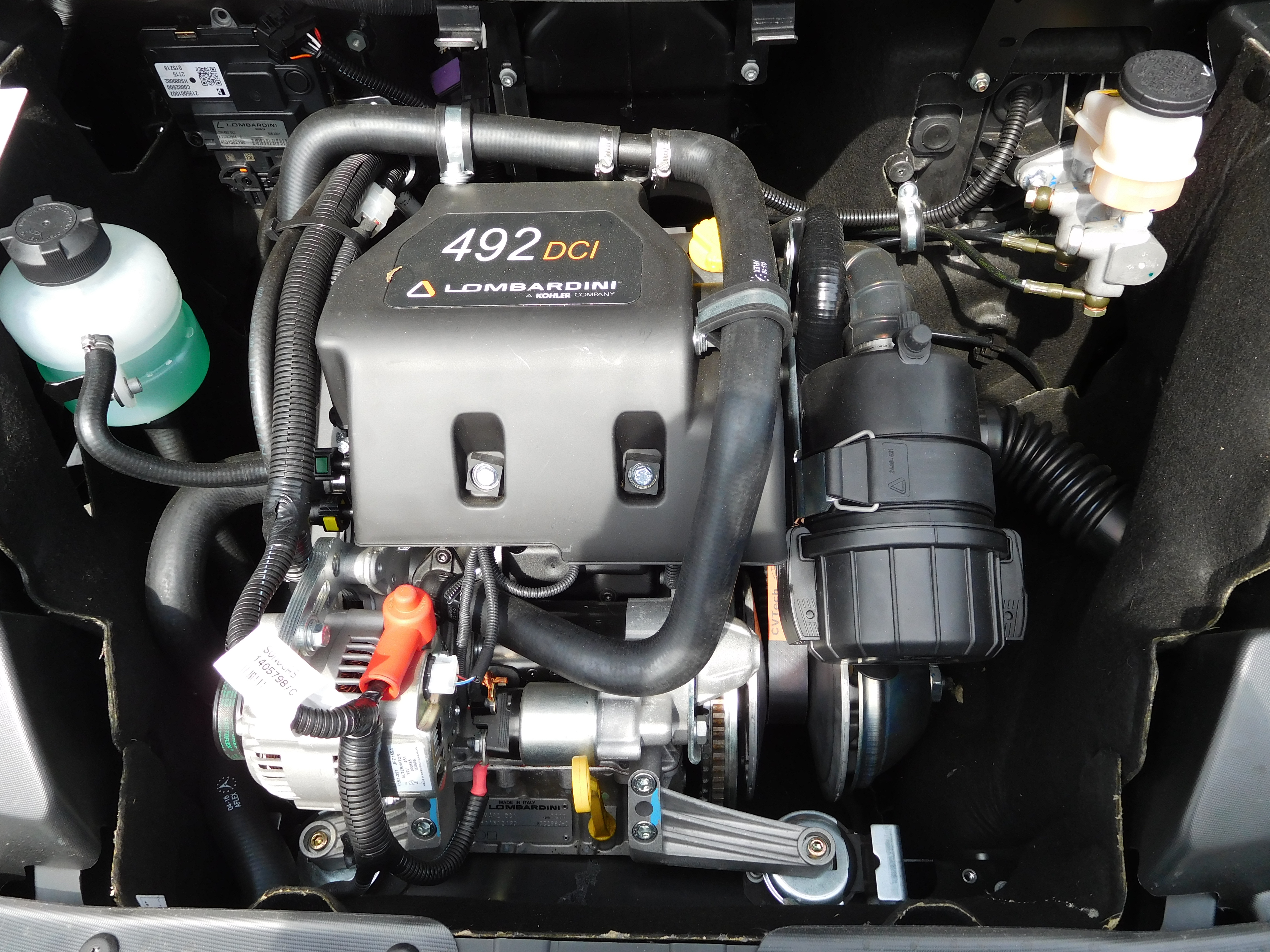 Moteur Lombardini 492 DCI (bicylindre) d'une Microcar M.Go 3 Highland X.